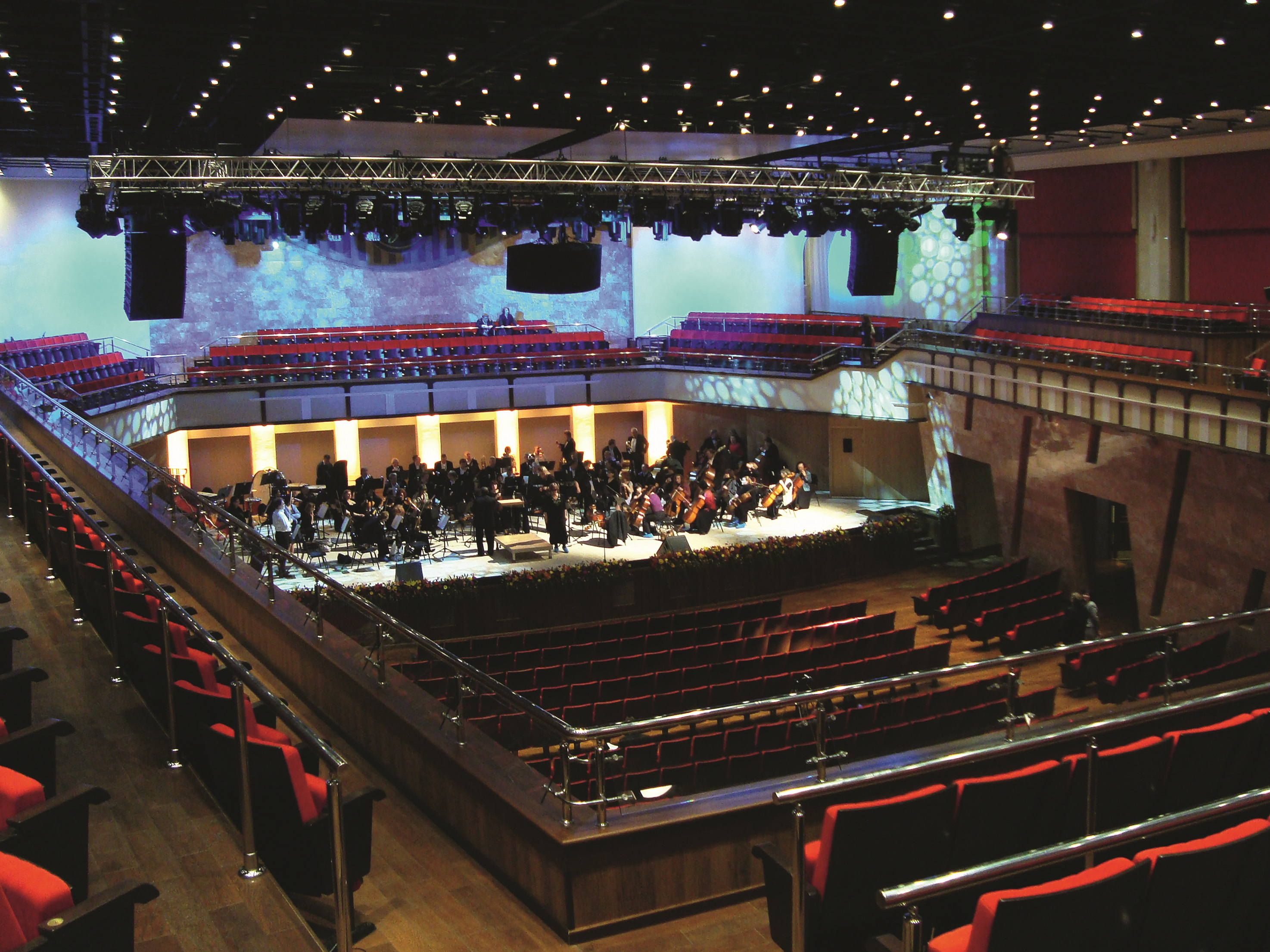 Реконструкция здания областной филармонии, г. Омск